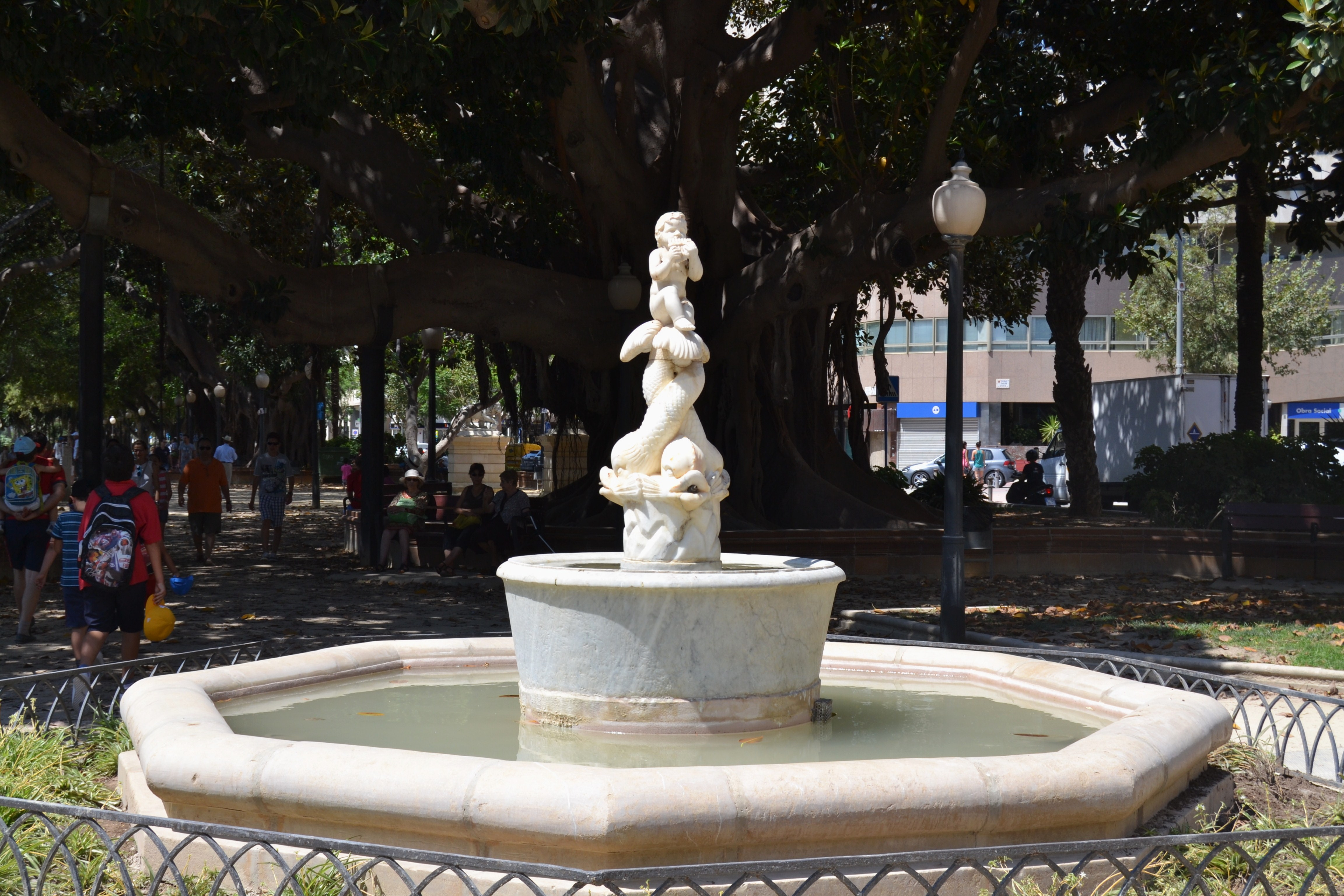 Font del Xiquet flautista del parc de Canalejas d'Alacant. Fou donada a l'ajuntament d'Alacant, en testament, per Sr. Manuel Prytz i Antoine, el 1942, any en què va ser ubicada al passeig. Prové de la casa Bonavista de Sant Joan. Per això es va encarregar a l'arquitecte municipal, Miguel López, la realització del safareig octogonal actual. Del jardí de la casa Bonavista, van eixir, igualment, la parella de lleons i la parella de gossos que es troben al mateix parc.